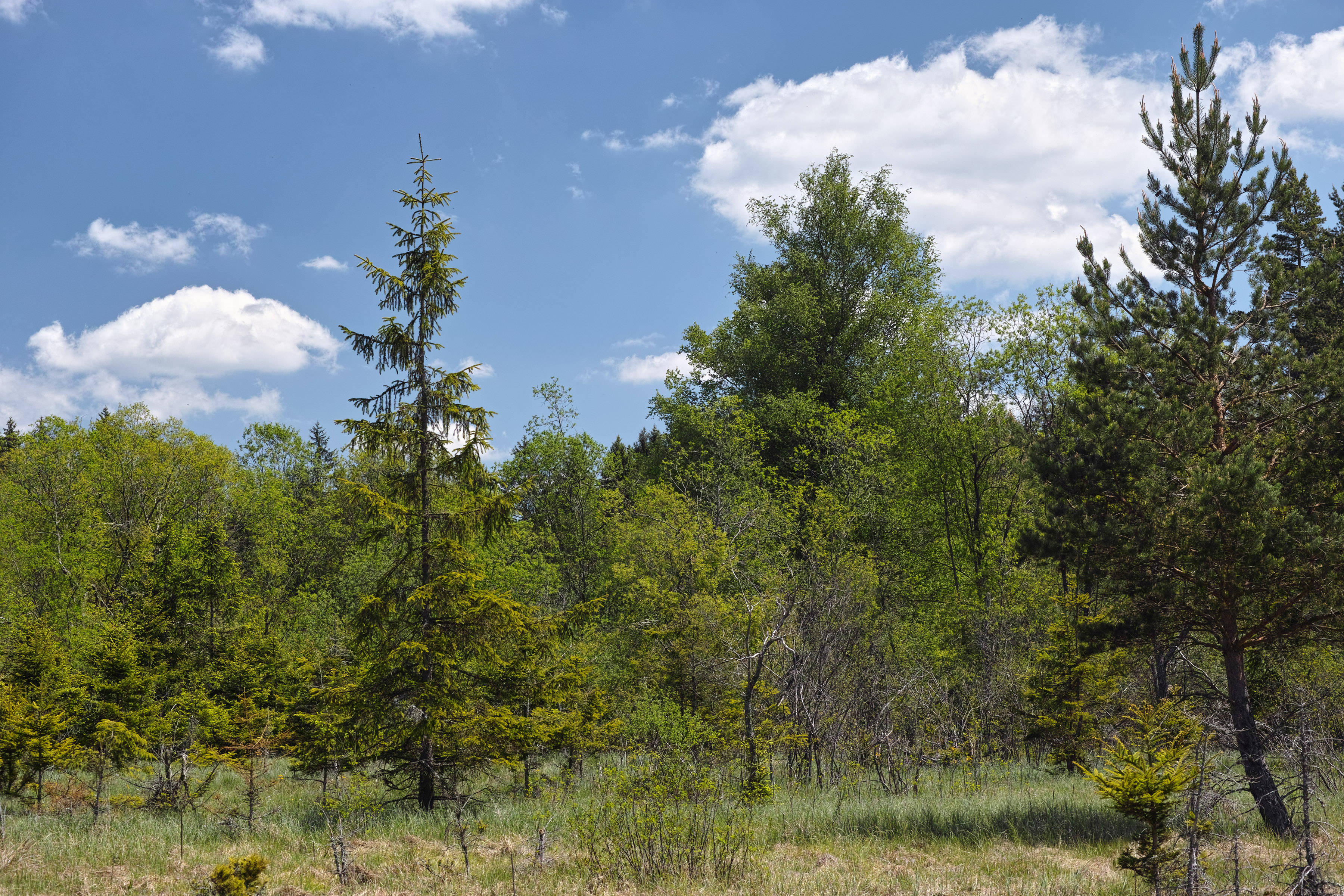 Přírodní památka Velké bahno, rašelinná louka